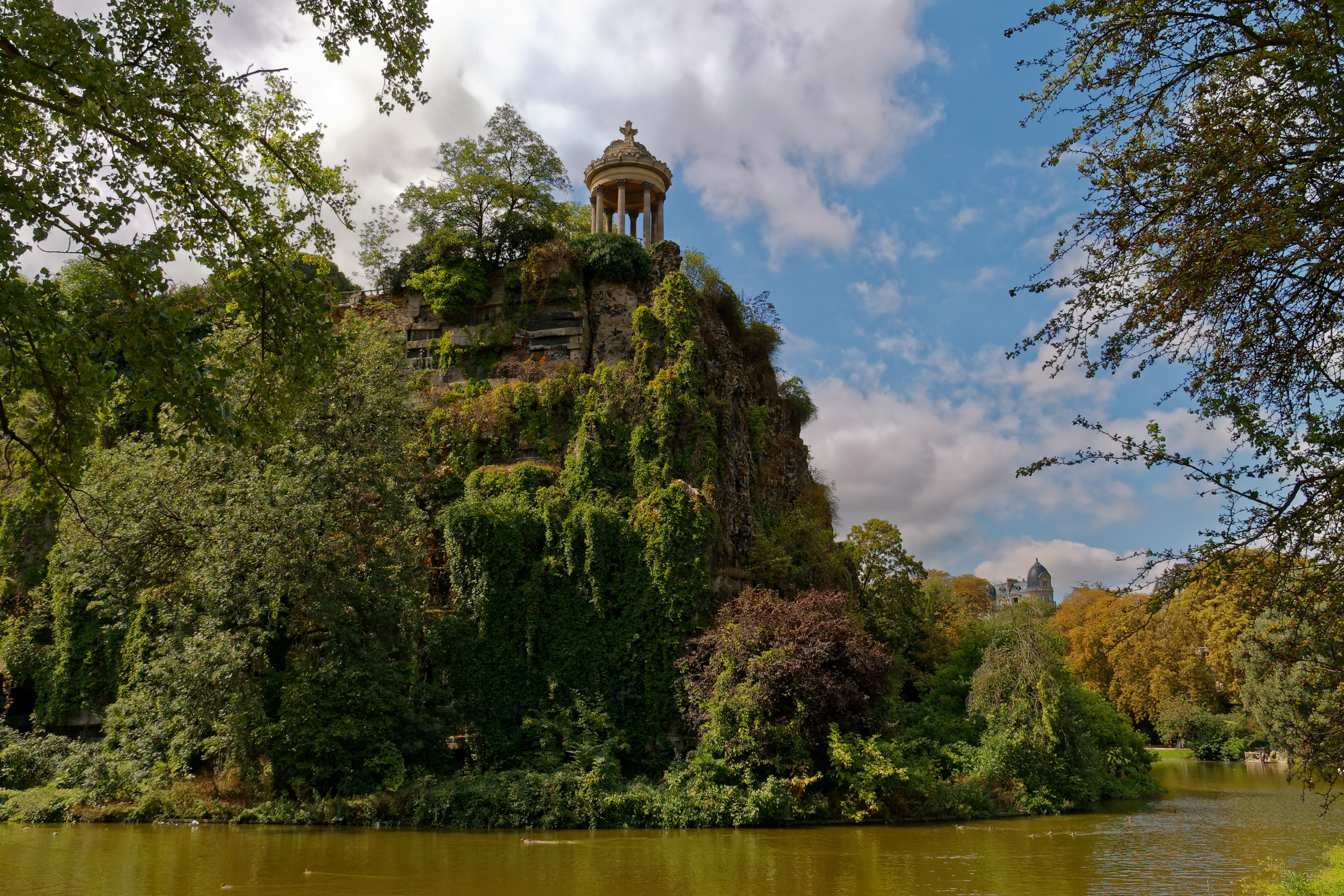 Ile du Belvédère, Parc des Buttes-Chaumont, Paris.